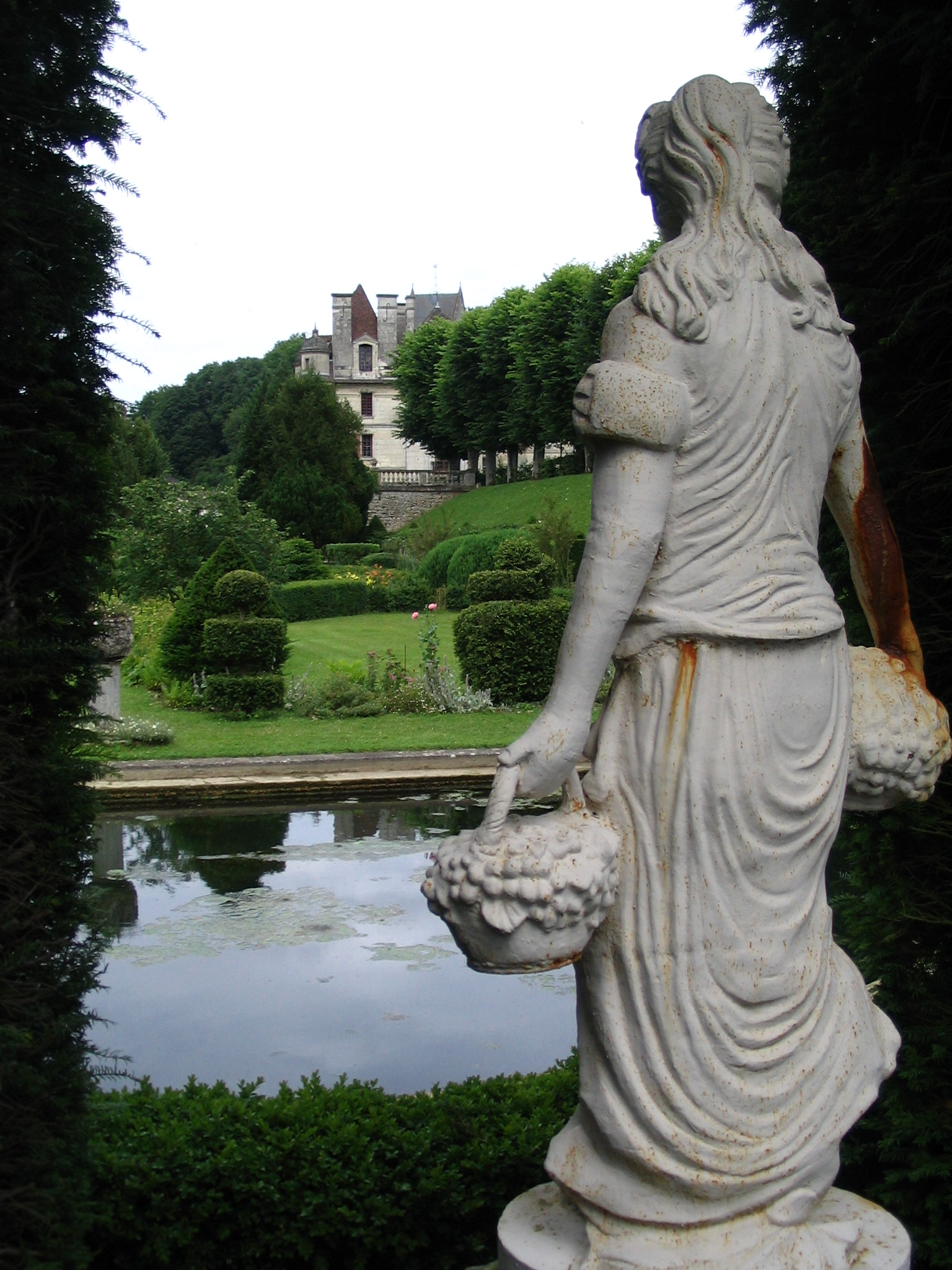 Chateau d'Ambleville, Val d'oise, France